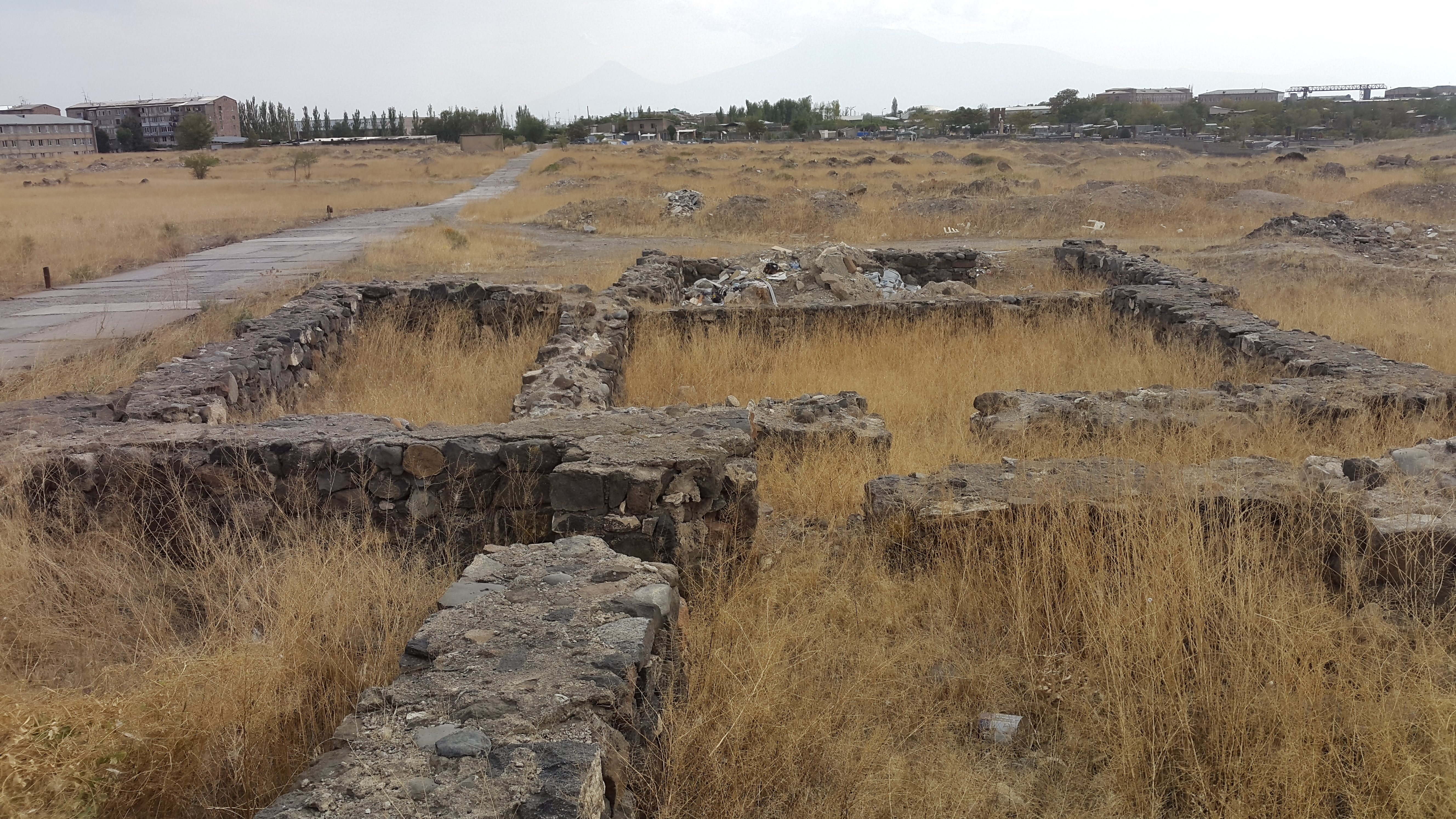 Թեյշեբաինիի բնակելի թաղամասը 11/22.1